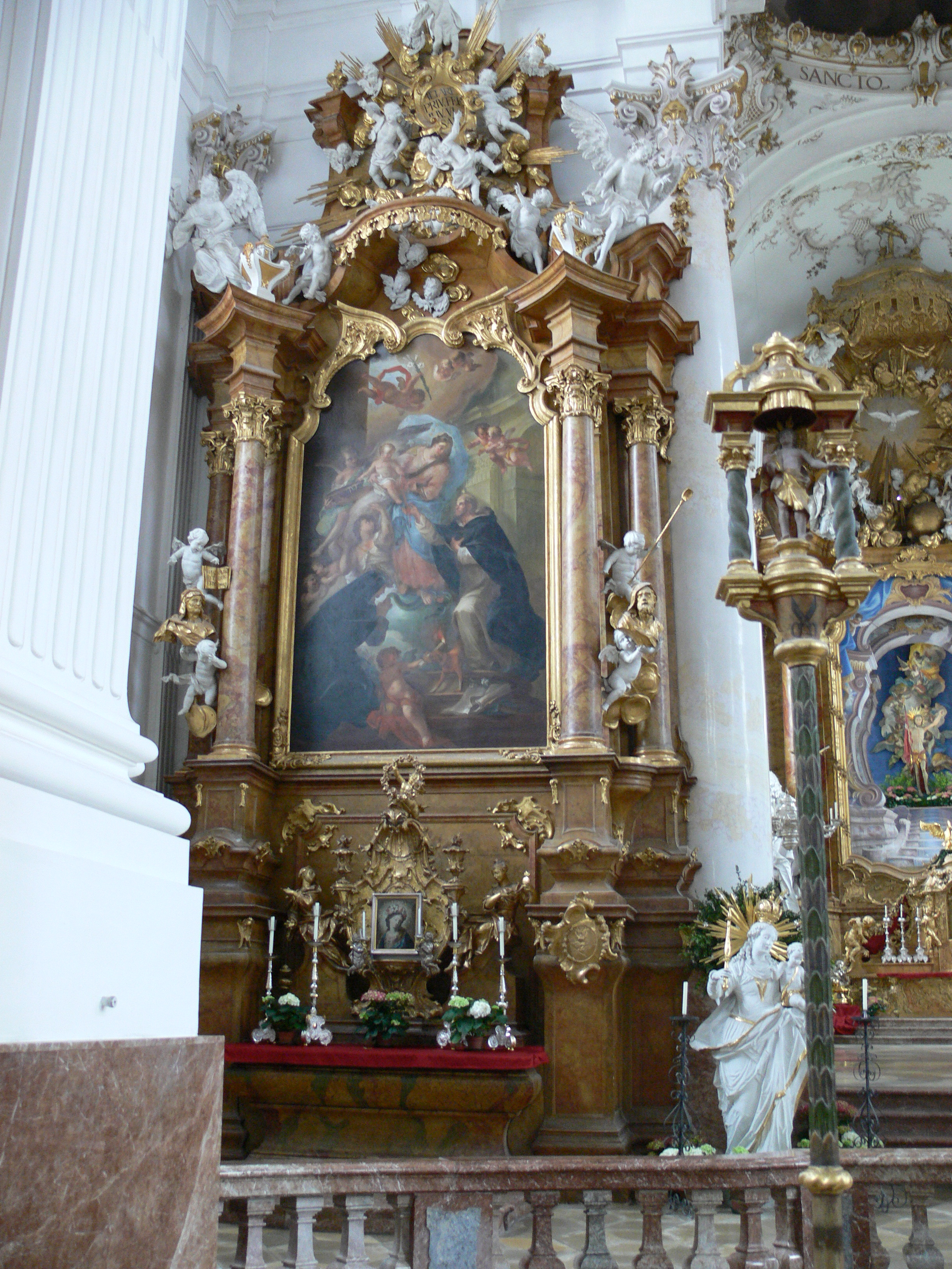 Marienmünster Dießen (ehem. Augustiner-Chorherren-Kirche Mariä Himmelfahrt, heute Pfarrkirche, Dießen am Ammersee)